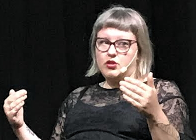 Charlotte Qvandt på Bokmässan i Göteborg 2019